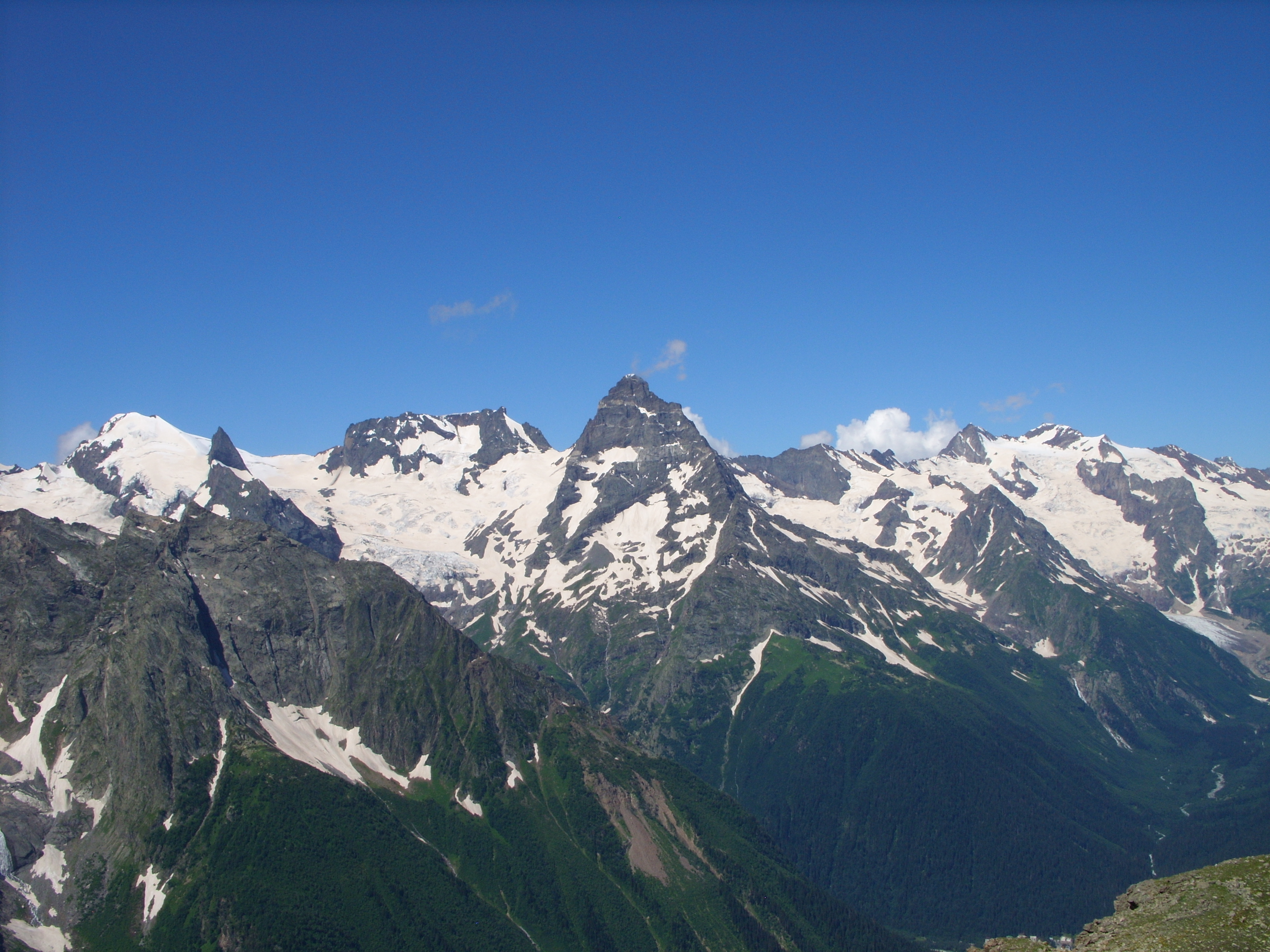 Экскурсия в Домбай из Железноводска, июль 2009 г.